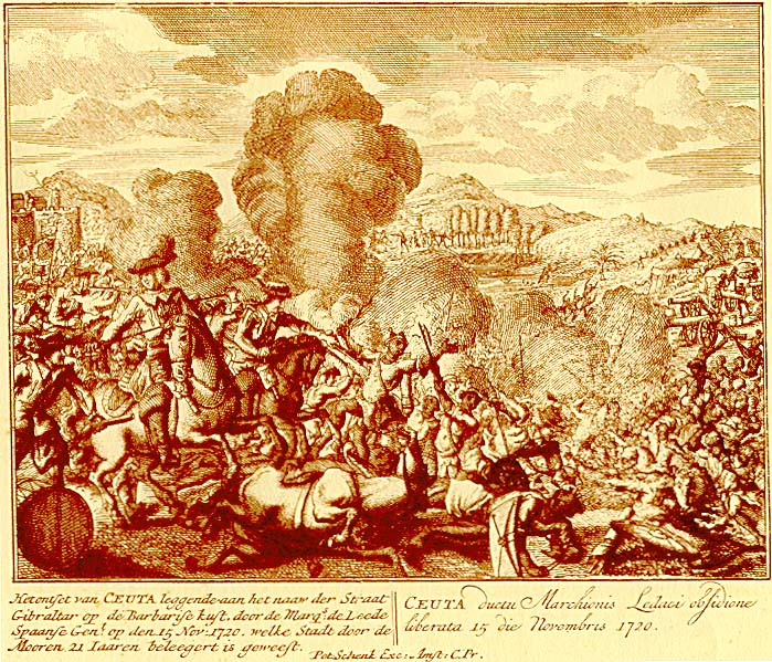 Representación de la expedición del Marqués de Lede en Ceuta durante el sitio del Muley Ismail en 1720.